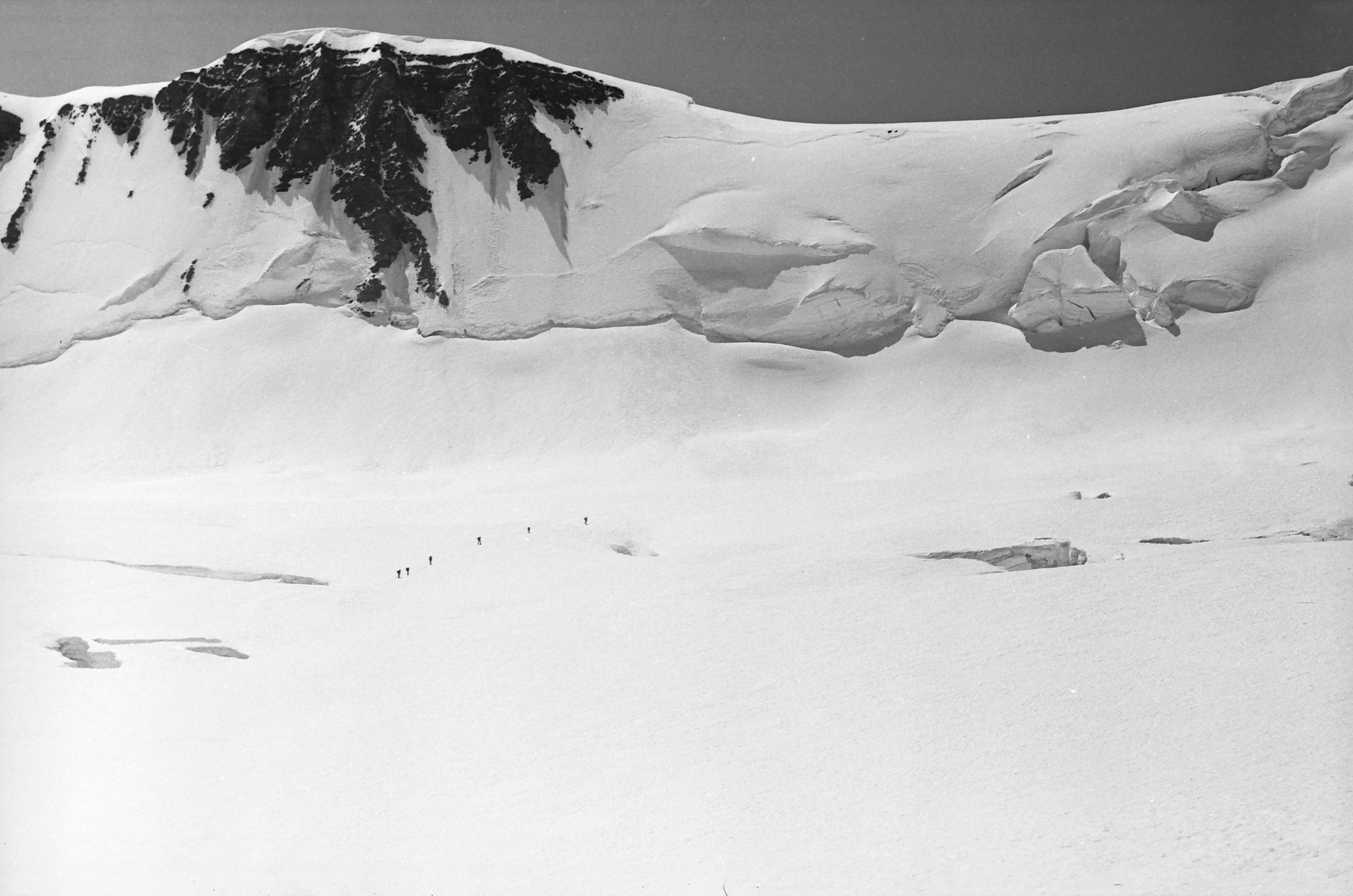 Ekspeditsioon mäetipule "Tartu Ülikool 350". Tõus Parrotile.